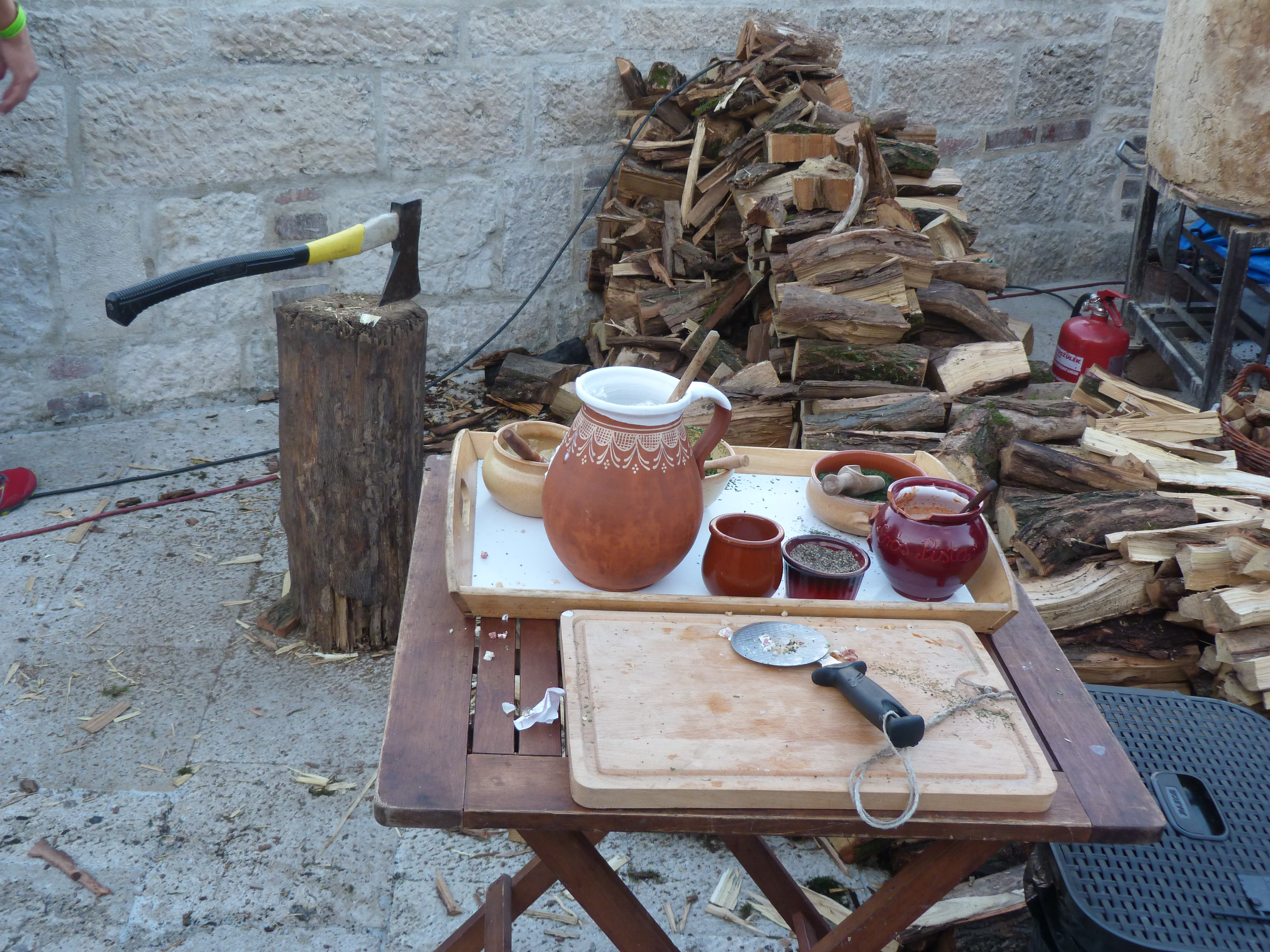 A felvétel 2014. szeptember 12-én, pénteken készült Budapesten, a 23. Budavári Borfesztiválon. Kilátás a várból. Források Bor és Pia borpiaci szakmai magazin 2014. augusztus Borfesztivál Melléklet 23. Budavári Borfesztivál kiállítási tájékoztató ©© Derzsi Elekes Andor, Budapest, 2014, A kép és filmfelvételek egészben, vagy részletekben másolását, bármilyen úton történő sokszorosítását és felhasználását a szerző ellenérték nélkül, jogutódjaira is kihatóan megengedi. Az engedély kiterjed a kereskedelmi célú hasznosításra is. Kéri azonban nevének feltüntetését a felhasználás során. A Metapolisz sorozat valamennyi képe és filmje Creative Commons alatti valamint kereskedelmi - for profit - célra is felhasználható. Ajánlott hivatkozás: Derzsi Elekes Andor: Metapolisz DVD line